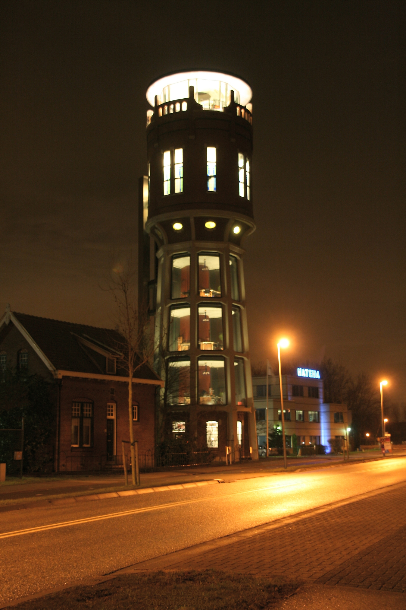 Hazerswoude-Rijndijk, watertoren bij nacht Hazerswoude-Rijndijk